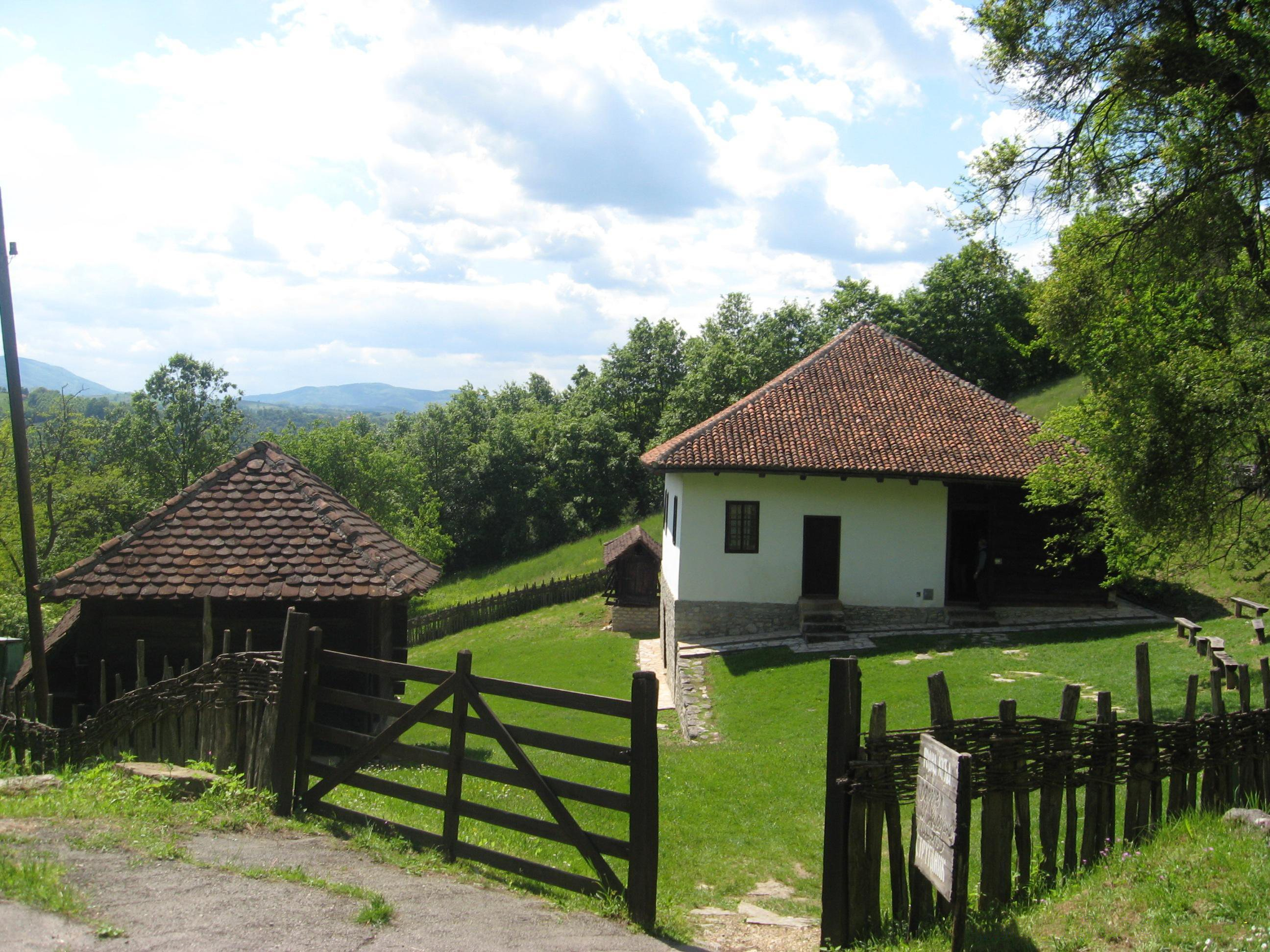 Струганик